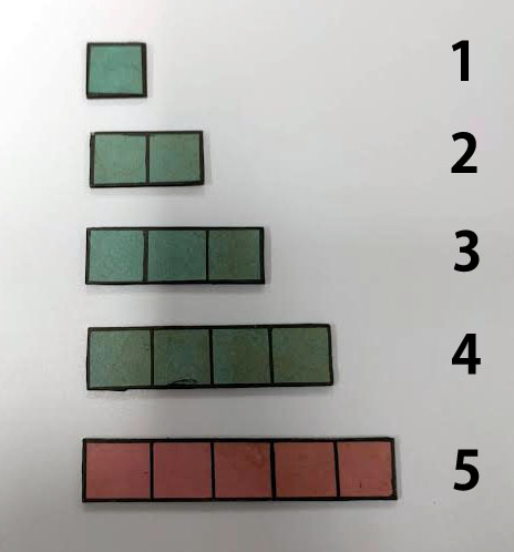 田籠松三郎が考案した骨牌による数の概念を教える方法